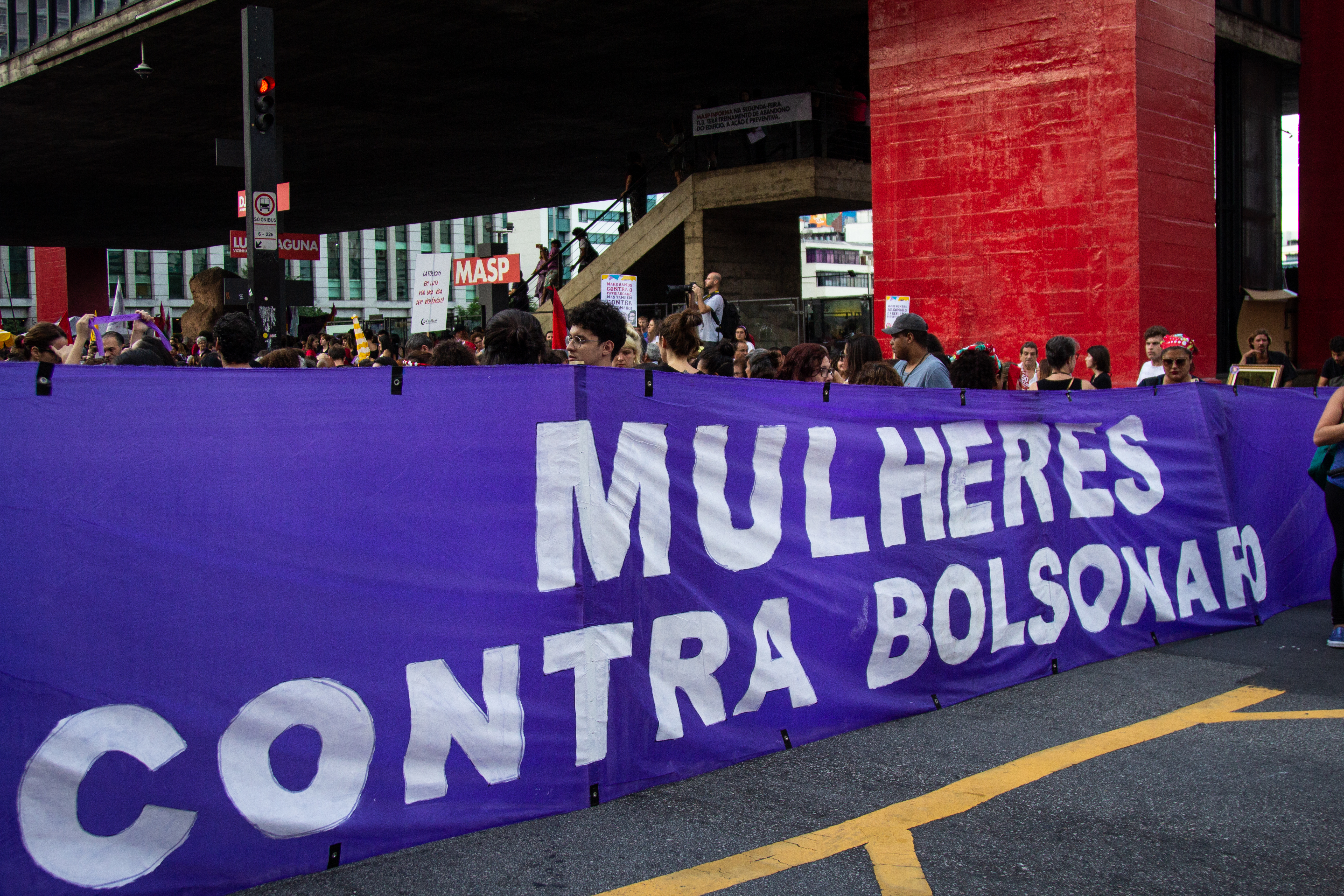 [2019-03-08] 8M São Paulo_010_Romerito Pontes